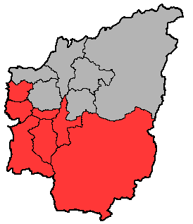 中文（台灣）: 南投第二選舉區